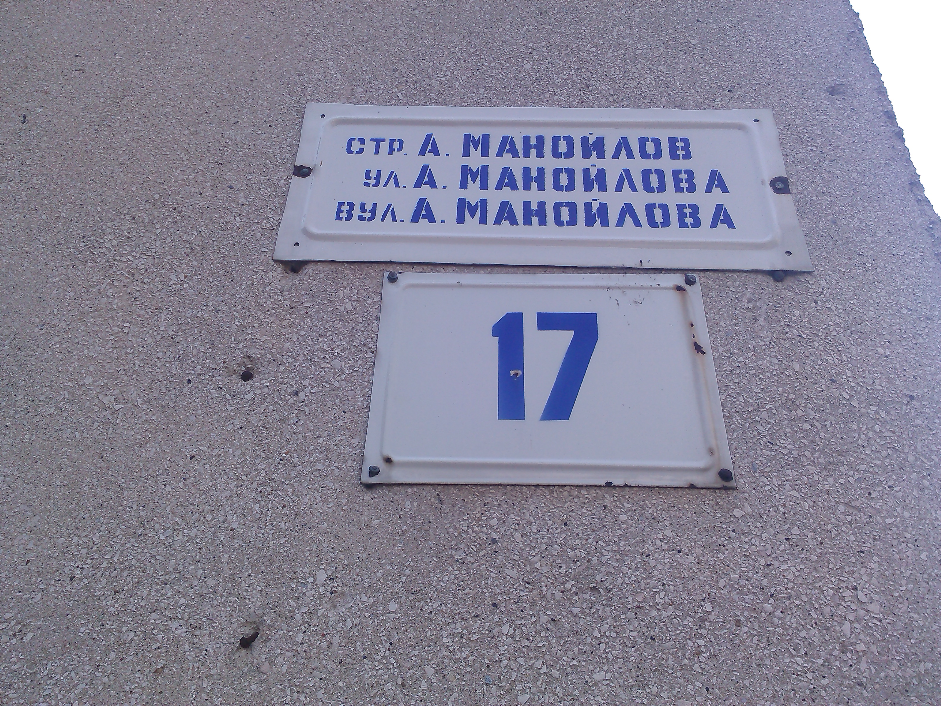 Dreisprachiges Straßenschild in Tiraspol